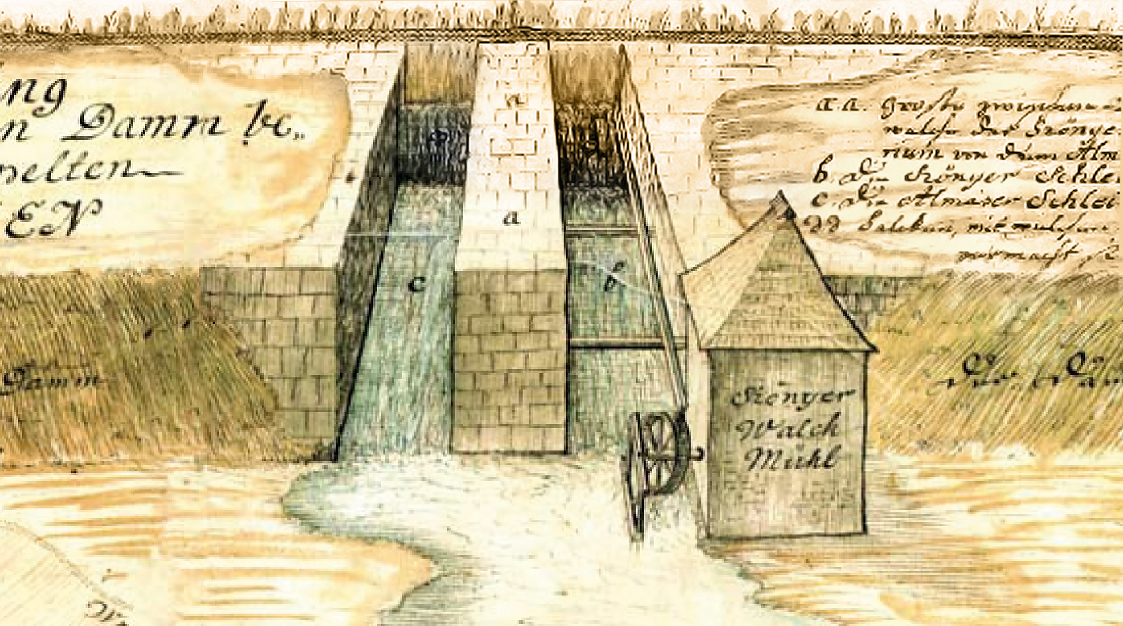 Die Szőnyer Walkmühle am Fekete-Bach in Nordungarn bei Almásfüzitő, Komitat Komárom-Esztergom. Das Wasserbauwerk mit den parallelen Abzugsgräben ist römischen Ursprungs und gehörte zu einem Dammsystem, das den am Donaulimes liegenden Kastellort Odiavum vor Überschwemmungen schützte. Zeichnung aus: Samuel Mikovíny: „Plan der zwischen Tata, Almás und Szőny liegenden Moresten. Den ursprung derselben so wohl, als auch mögliche ausdrückerung vorstellend.“